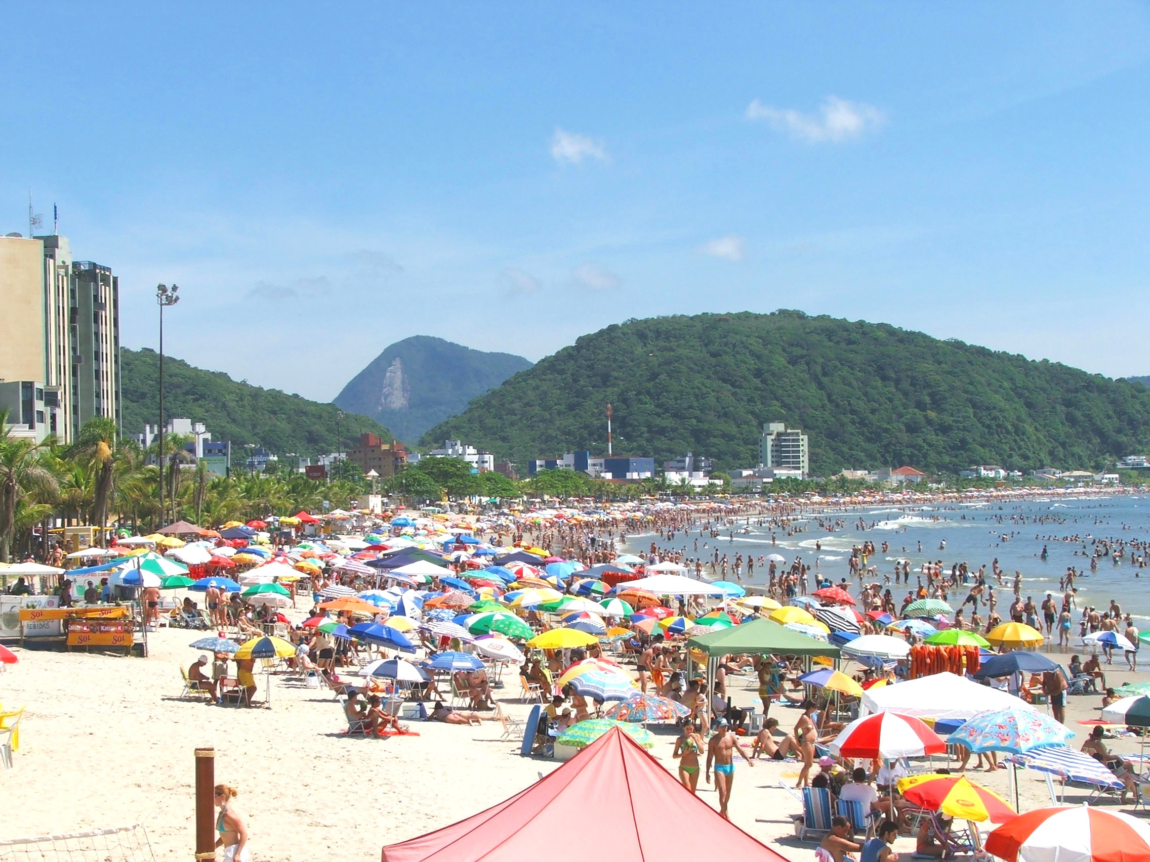 Praia princiapal de Guaratuba.